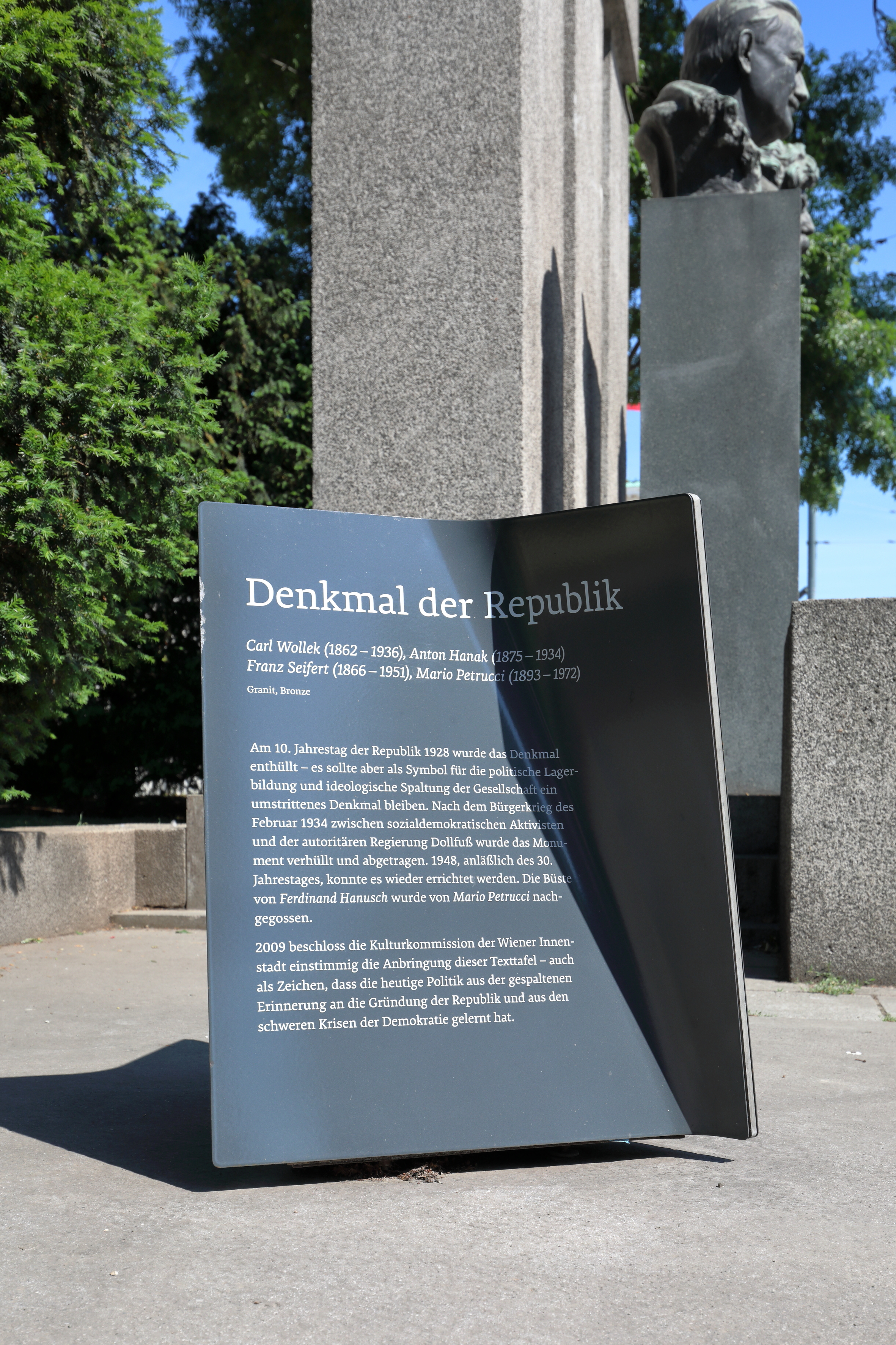 Infotafel beim sozialistischen Denkmal der Republik, auch Republikdenkmal bezeichnet, am Dr.-Karl-Renner-Ring zwischen Parlamentsgebäude und Palais Epsteinim 1. Wiener Gemeindebezirk Innere Stadt.Das Denkmal mit der Inschrift im Architrav: „Der Erinnerung an die Errichtung der Republik am 12. November 1918“ wurde unter dem sozialistischen Bürgermeister Karl Seitz anlässlich des zehnten Jahrestages der Ausrufung der Republik Deutschösterreich errichtet und gedenkt der sozialdemokratischen Politiker Jakob Reumann, Victor Adler und Ferdinand Hanusch. Zur Zeit des Ständestaates wurde es demontiert und 1948 wieder aufgestellt. 2009 beschloss die Kulturkommission der Wiener Innenstadt einstimmig die Anbringung dieser Texttafel - „auch als Zeichen, dass die heutige Politik aus der gespaltenen Erinnerung an die Gründung der Republik und die schweren Krisen der Demokratie gelernt hat“.